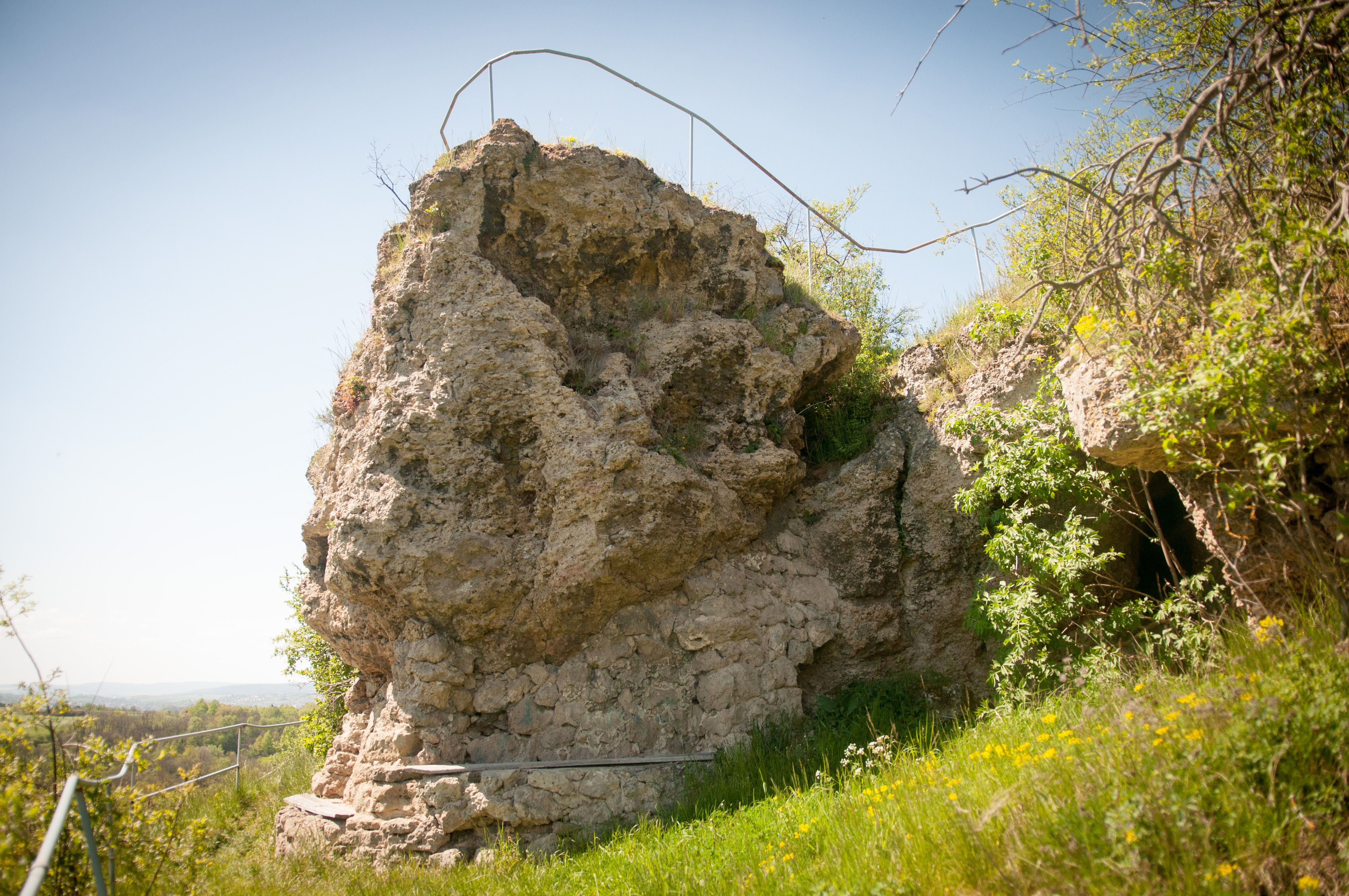 FFH-Gebiet Östliches Riffgebiet Orlatal: der Totenstein über der Harrasmühle galt bereits für die Frühkulturen als religiöse Stätte